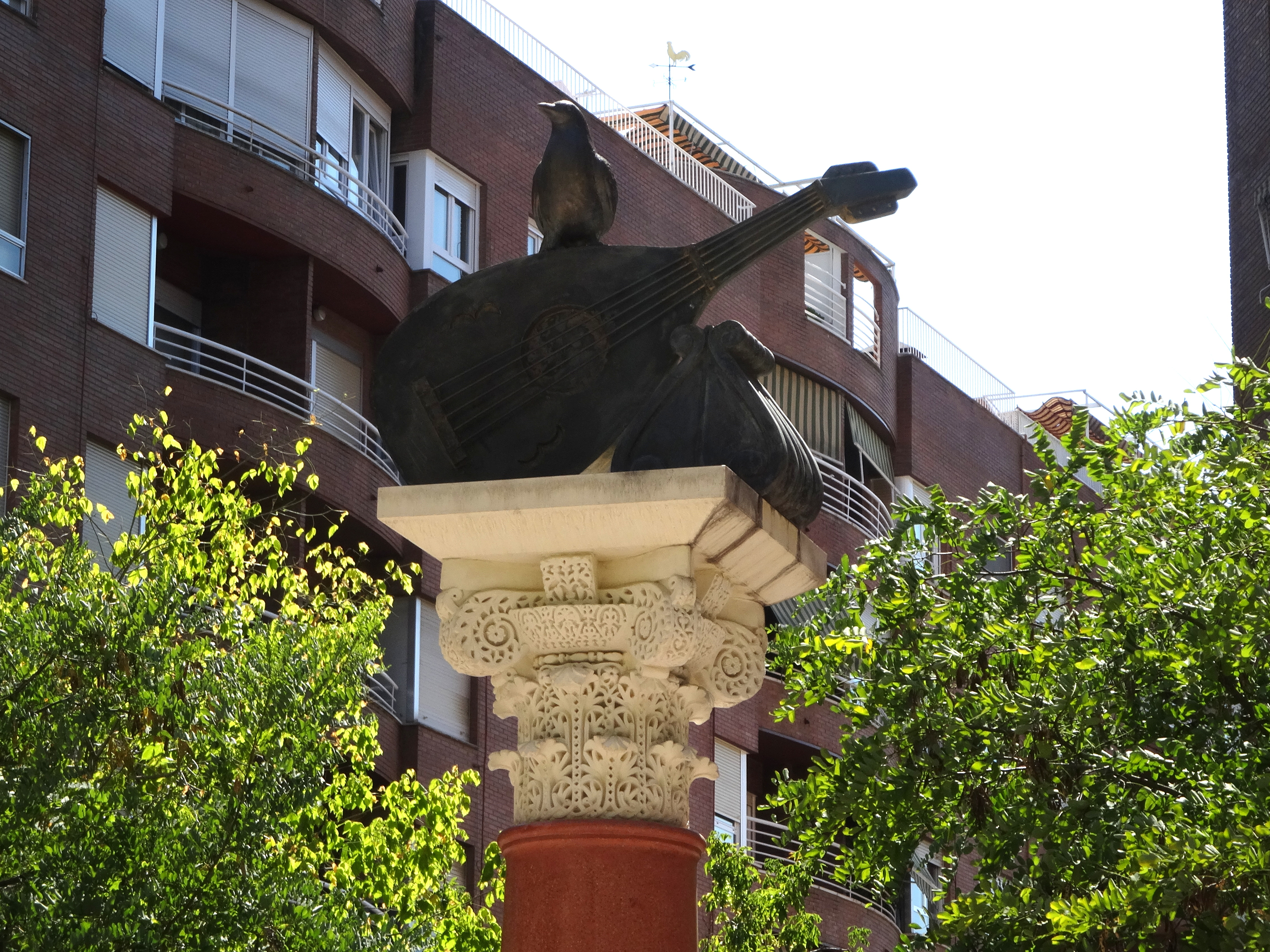 Monumento a Ziryab, Córdoba (España).